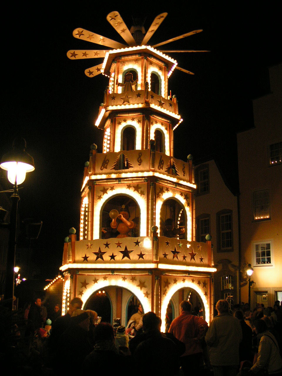 Pyramide auf dem Weihnachtsmarkt Osnabrück